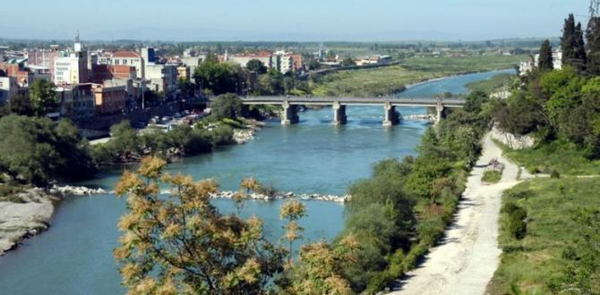 Rhyndacus-Mustafa Kemalpaşa çayı